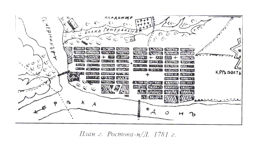 План Ростова на Дону. 1781г.